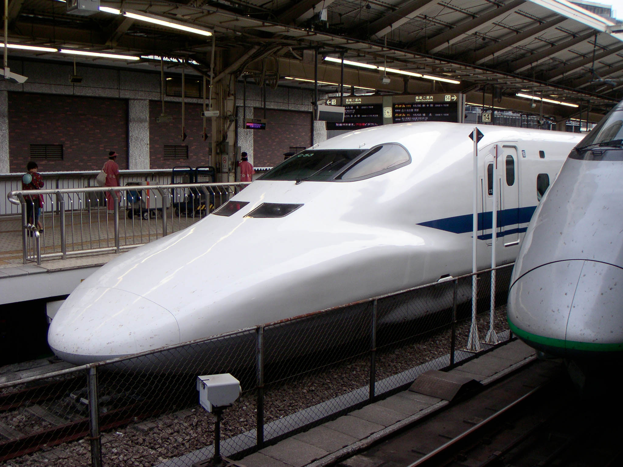 700 series train at Tokyo Station, Tokaido Shinkansen